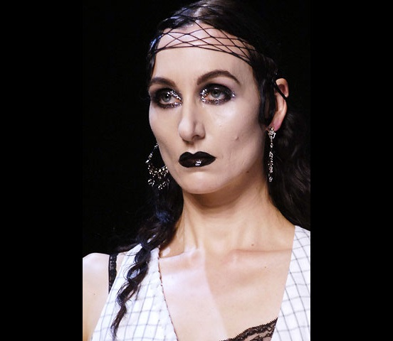 Mika'ela Fisher - John Galliano Fashion Show